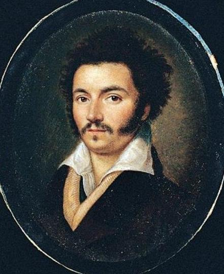 Ritratto giovanile del ministro Vincenzo Mistrali, miniatura conservata nel Museo Glauco Lombardi di Parma.